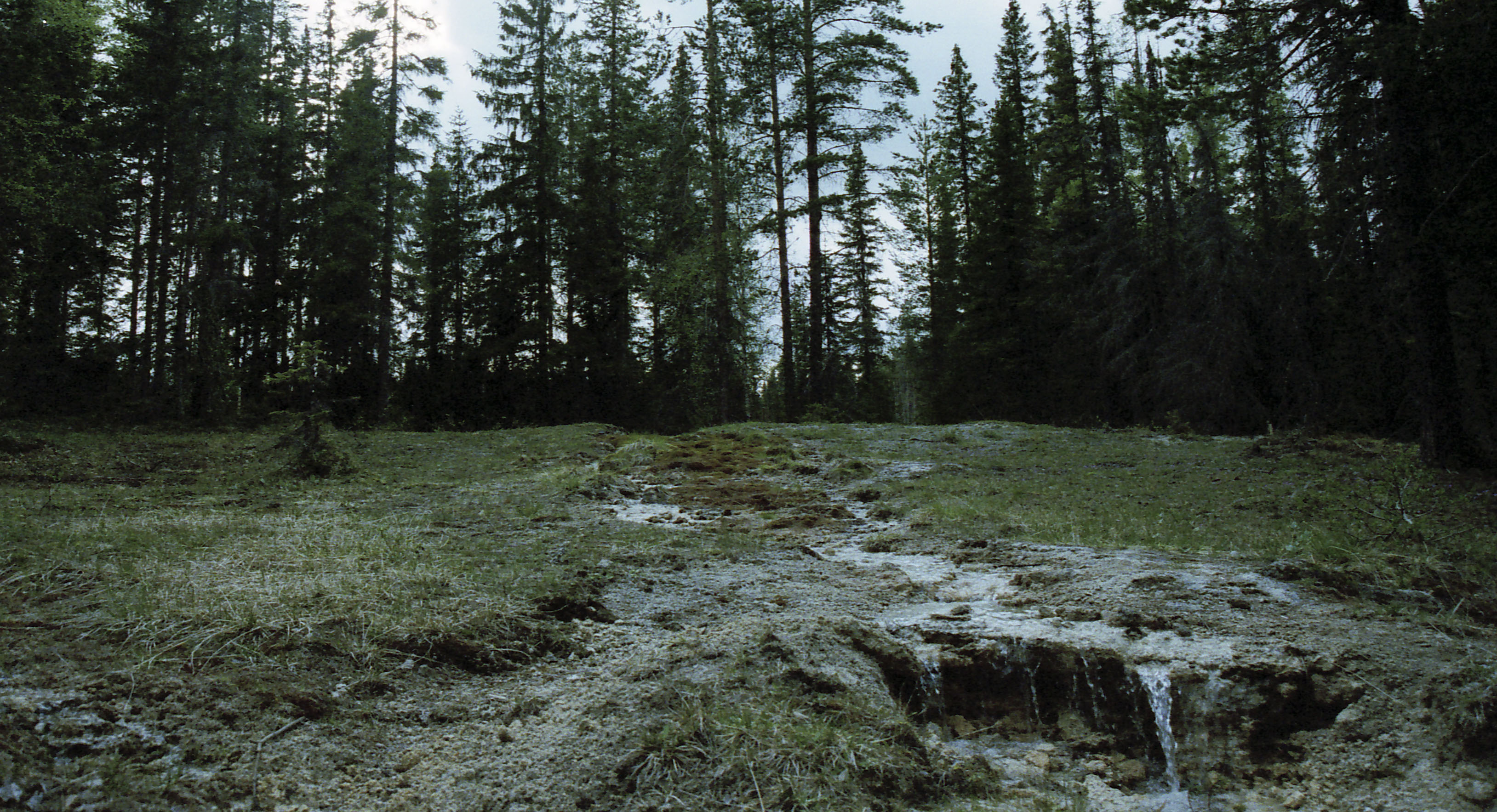 Fillstabäckens naturreservat utanför Östersund